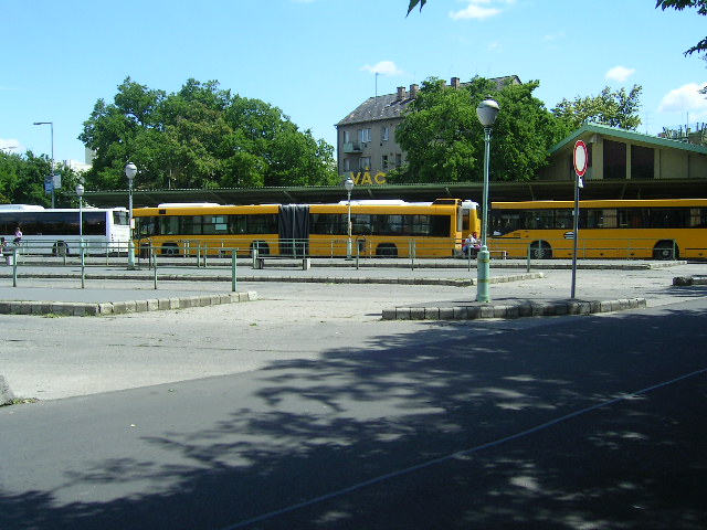 Váci autóbusz-állomás